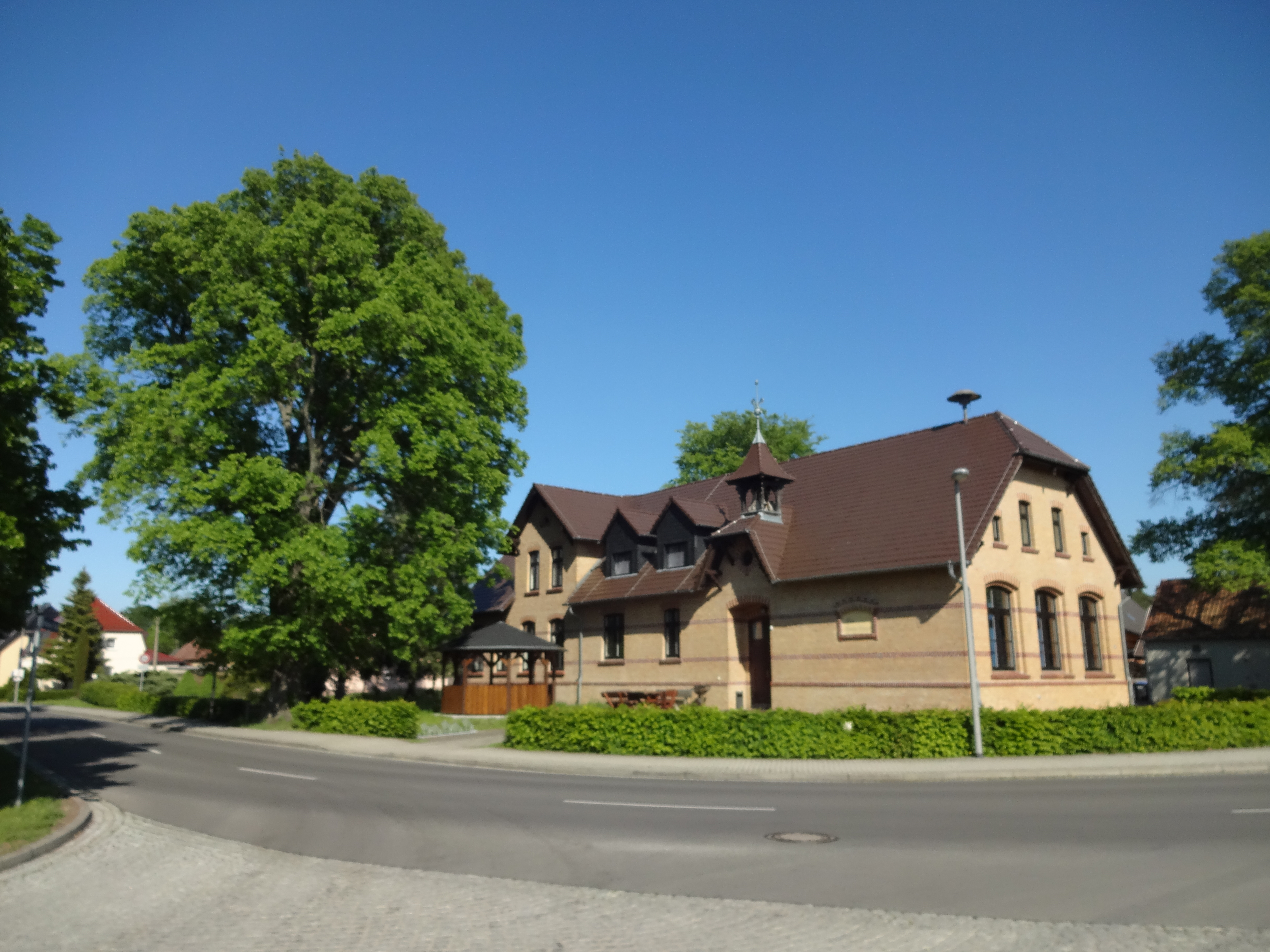 als Naturdenkmal geschützte Flatterulme vor der ehemaligen Schule in Peickwitz